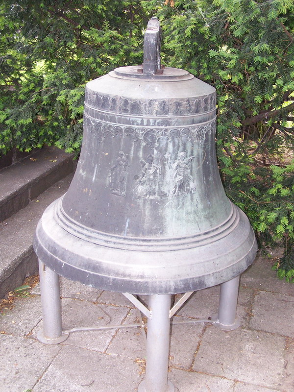 Polska, województwo wielkopolskie, powiat pleszewski, Dobrzyca (powiat pleszewski), dzwon z kościoła pw. Św. Tekli w Dobrzycy ufundowany przez Teresę Rydzyńską.